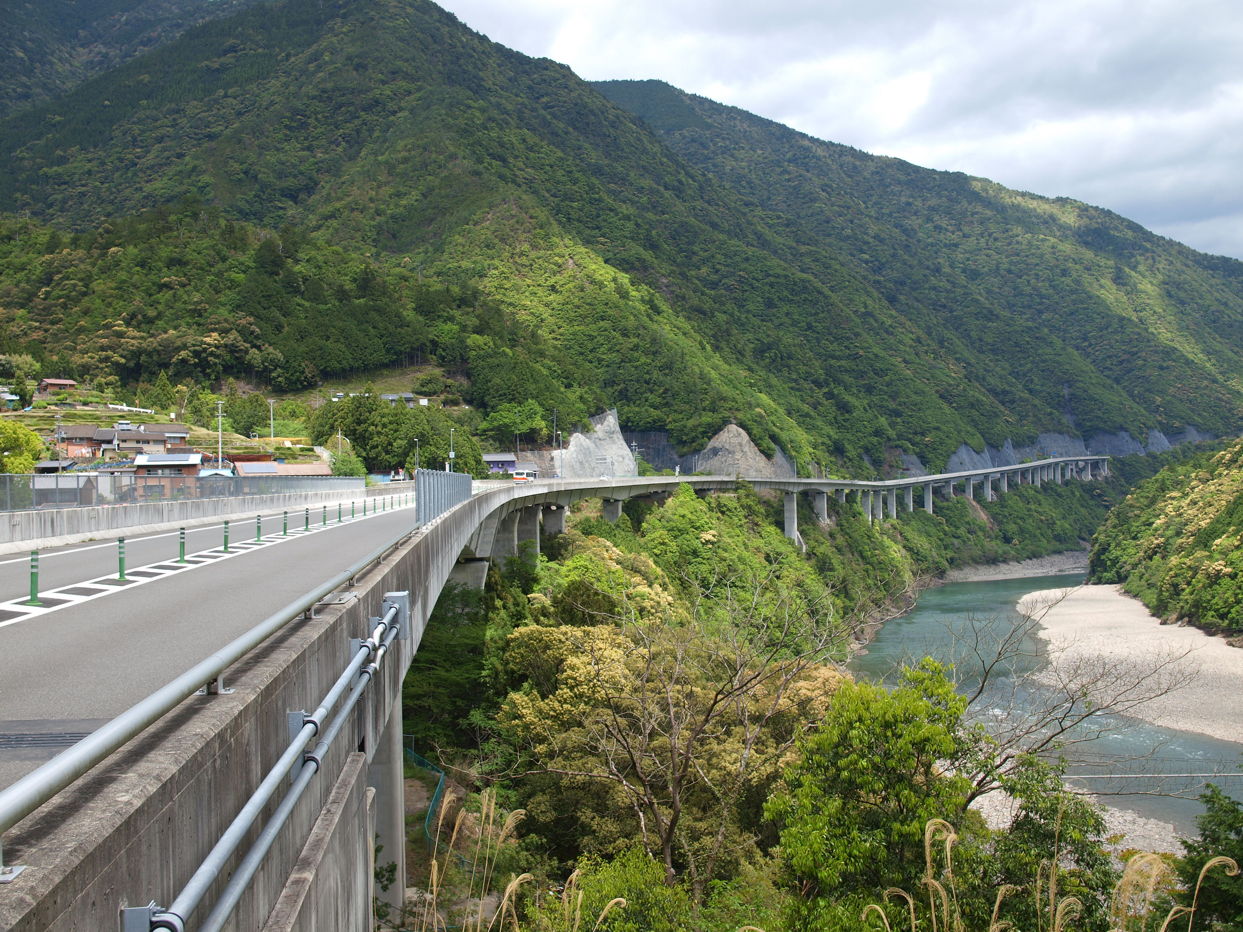 七色高架橋（奈良県吉野郡十津川村） 2009年4月撮影。 機材：E-30 撮影者：Kansai explorer